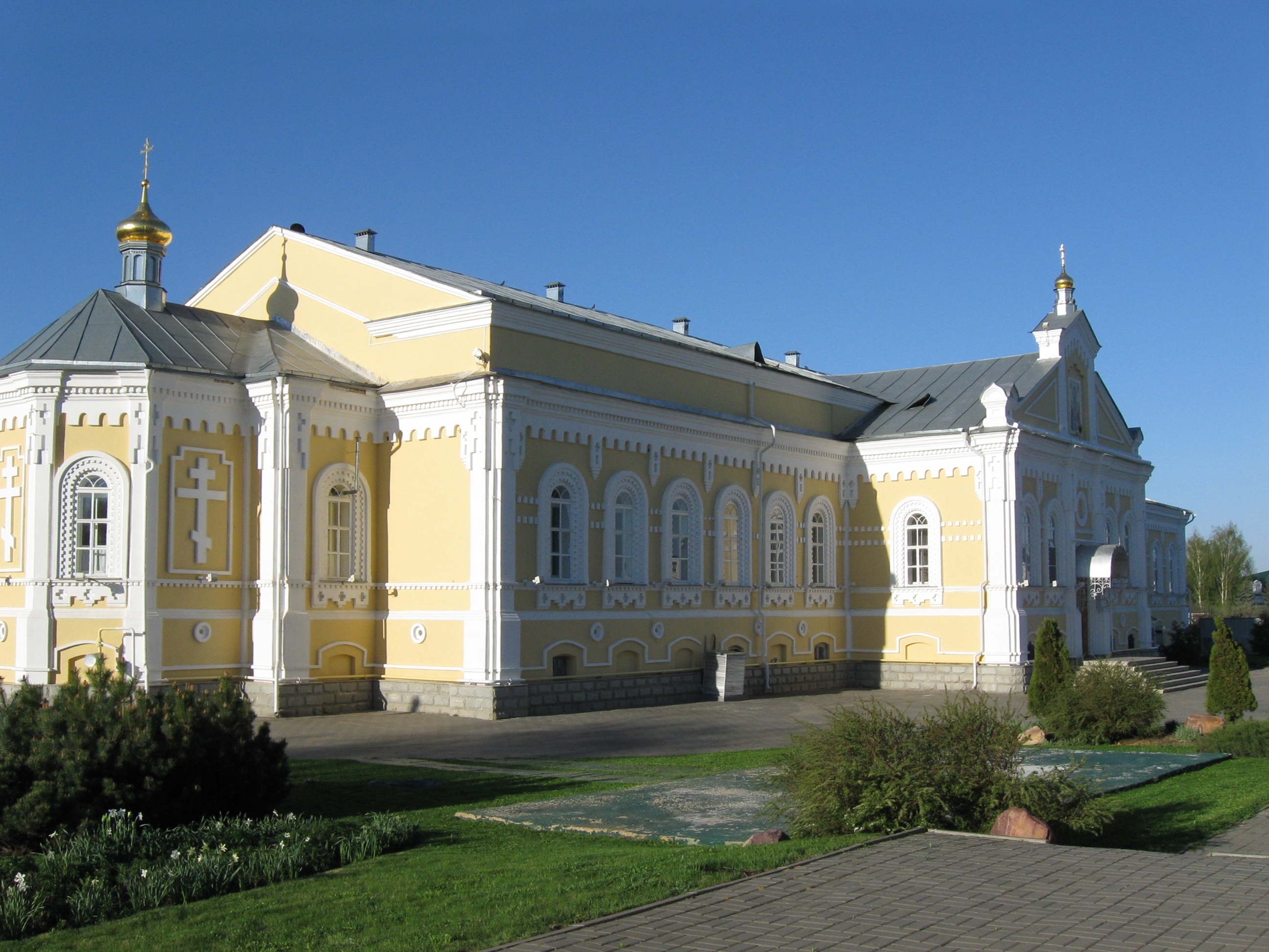 Трапезный храм святого благоверного князя Александра Невского в Свято-Троицком Серафимо-Дивеевском женском монастыре